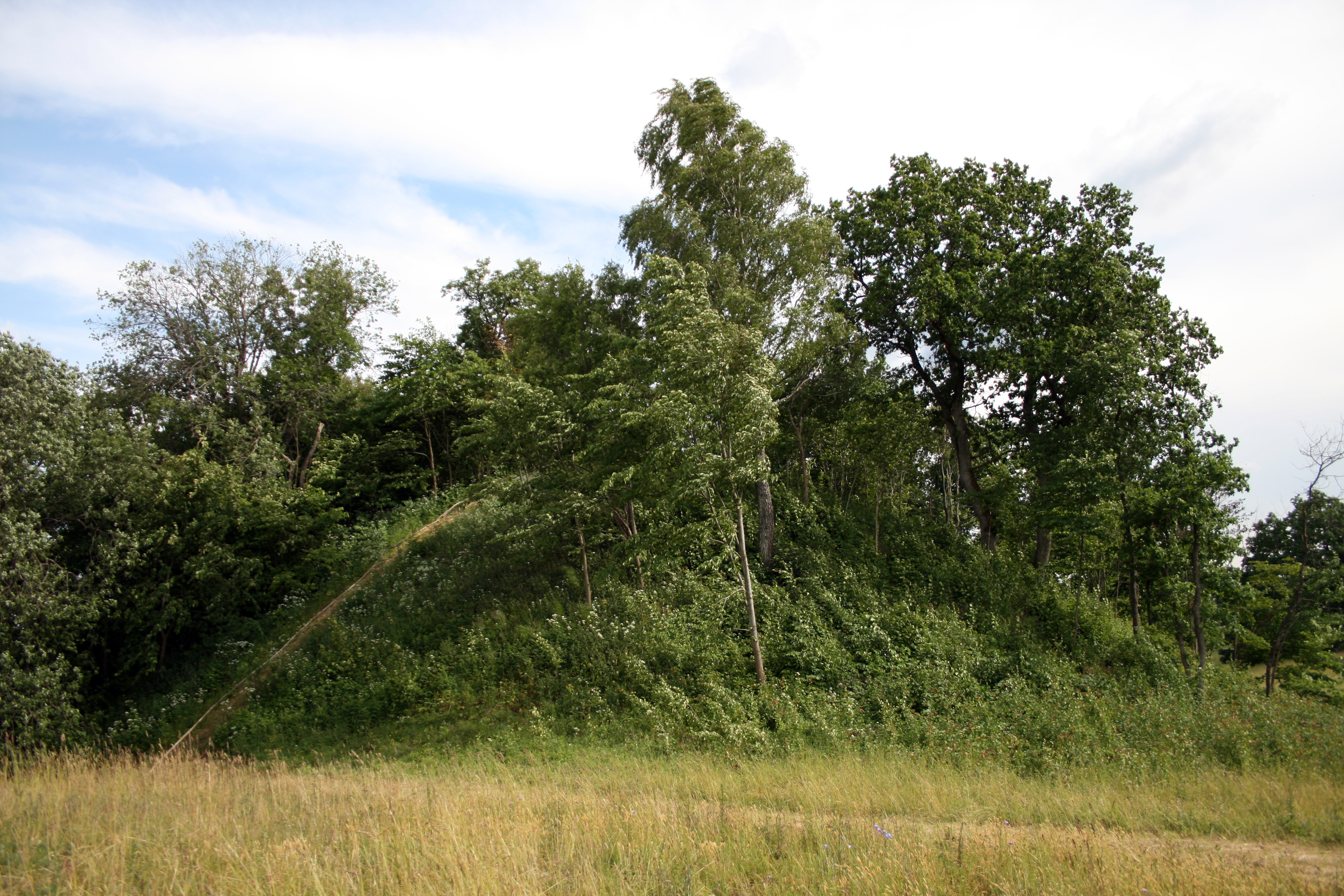 Šarnelės piliakalnis